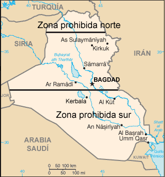 Mapa de Irak en el que se señalan las zonas de exclusión aérea o prohibidas para la aviación, al norte y sur de determinados paralelos.